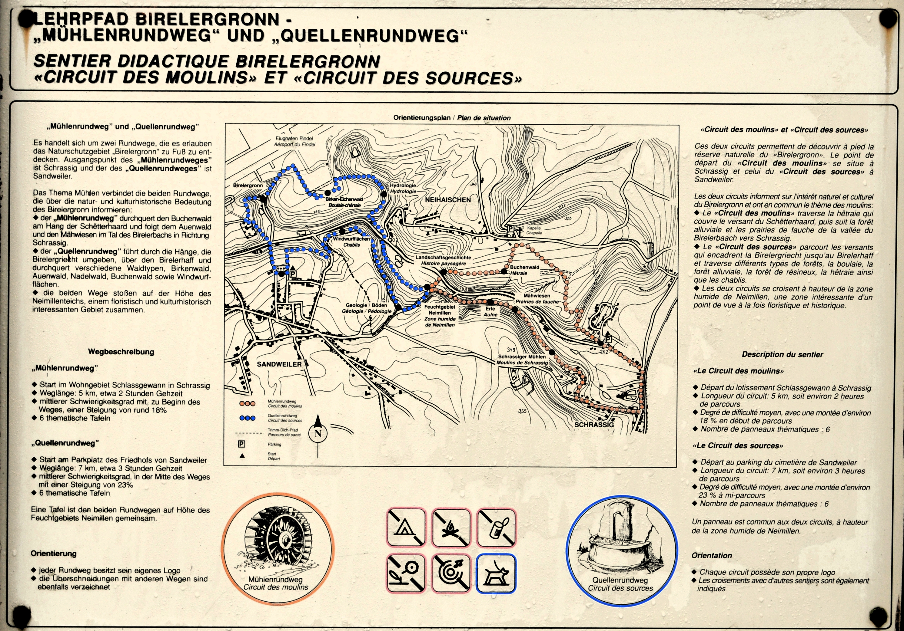 Informatiounspanneau beim Sandweiler Kierfecht.